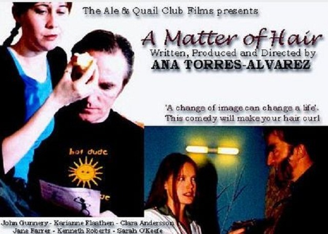 Poster del cortometraje A Matter of Hair